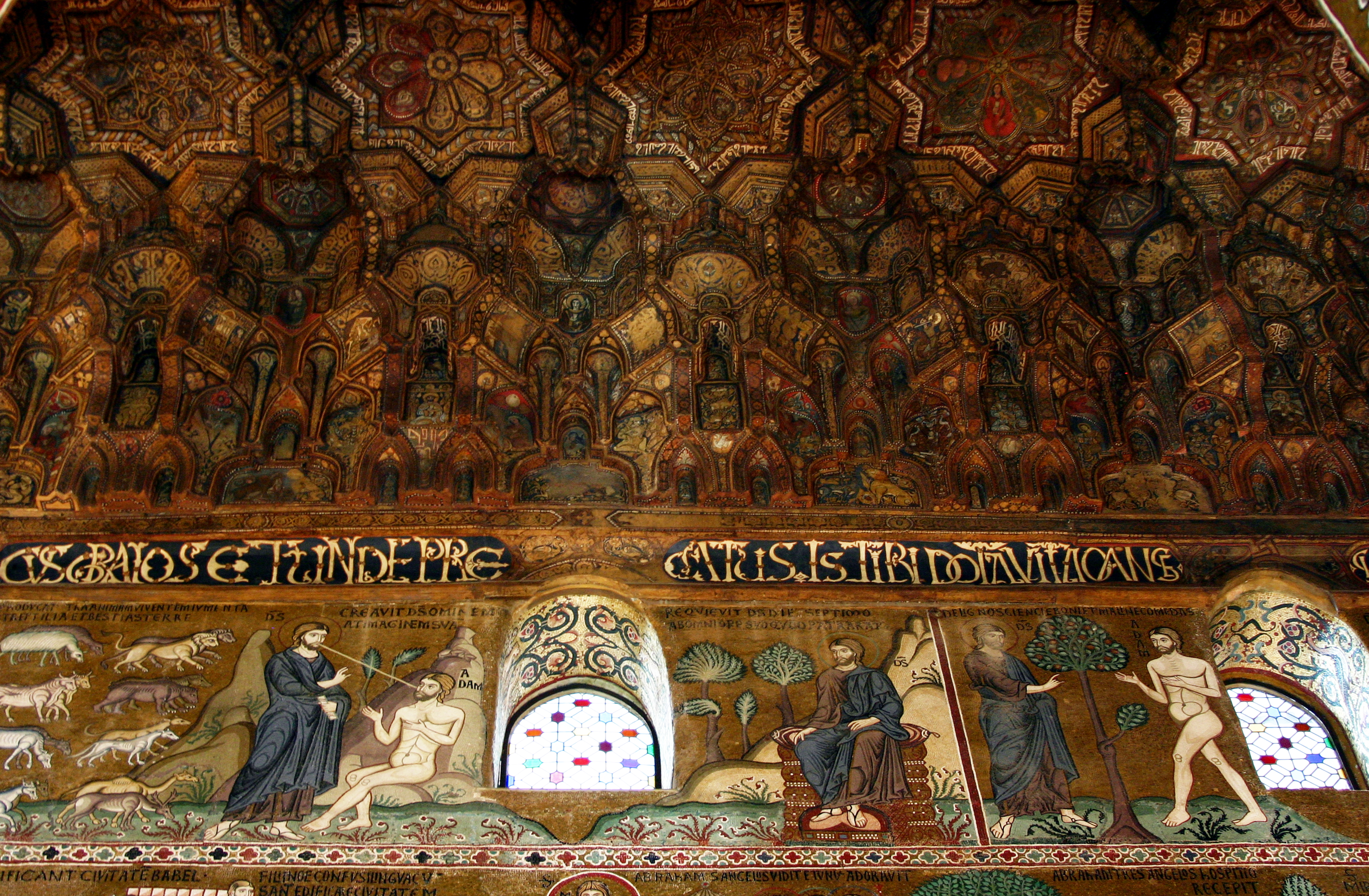 Capela Palatina